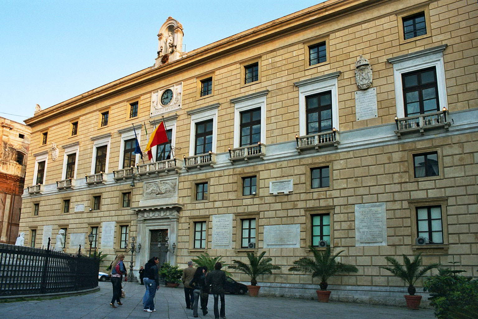 Palazzo Pretorio, Palermo Main facade at Piazza pretoria